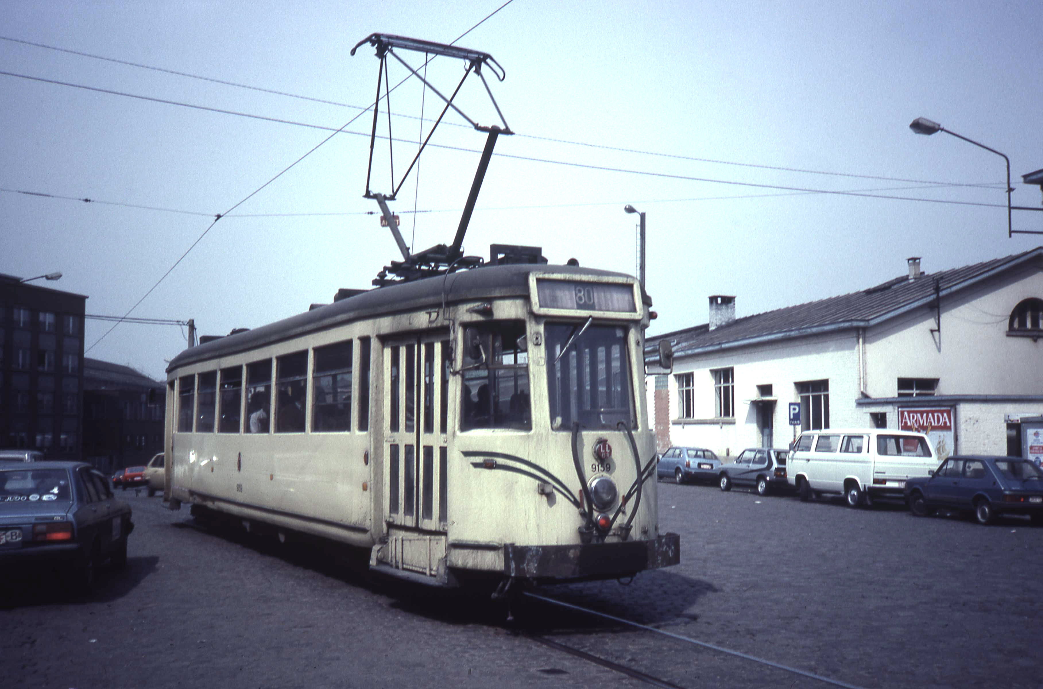 De tram 80 voor het station van Marchienne-au-Pont